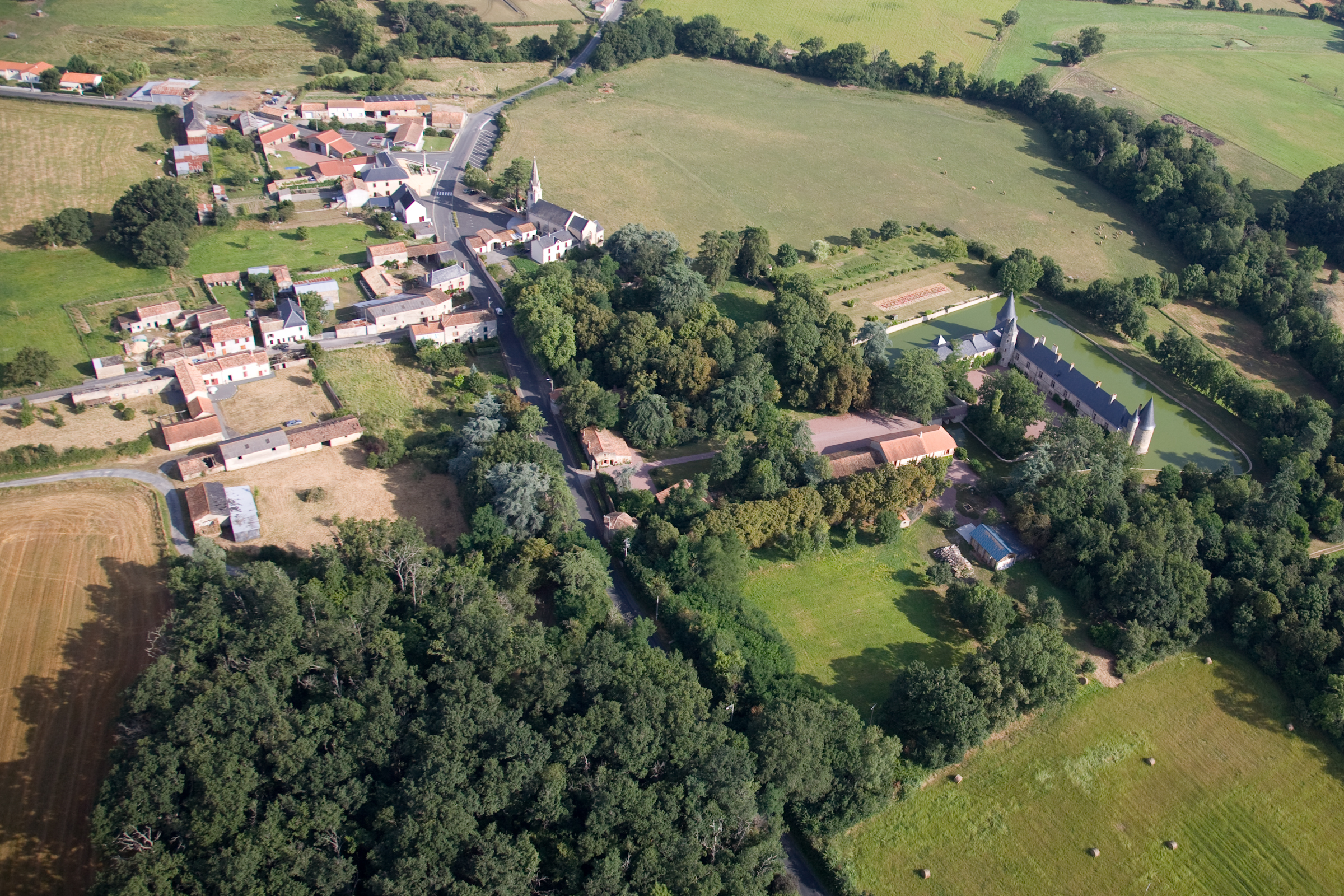 Commune de Maisontiers vue du ciel